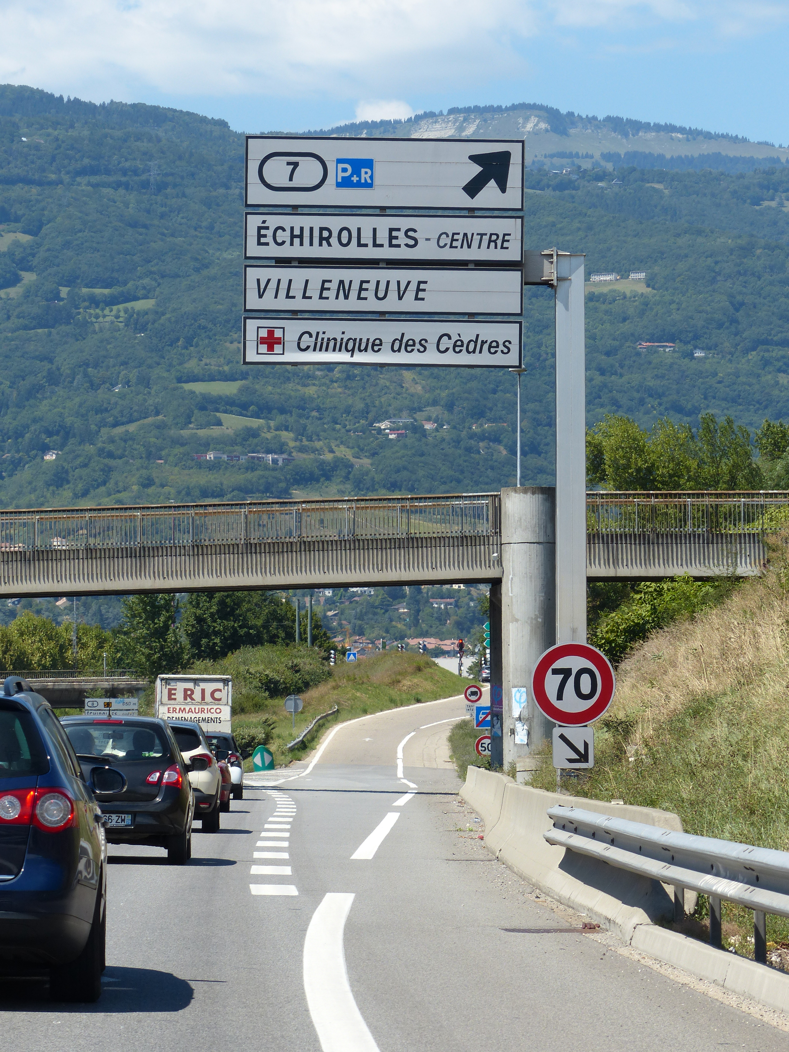 Panneau sortie 7 Échirolles-Centre Villeneuve, N87, Échirolles, Isère, France.